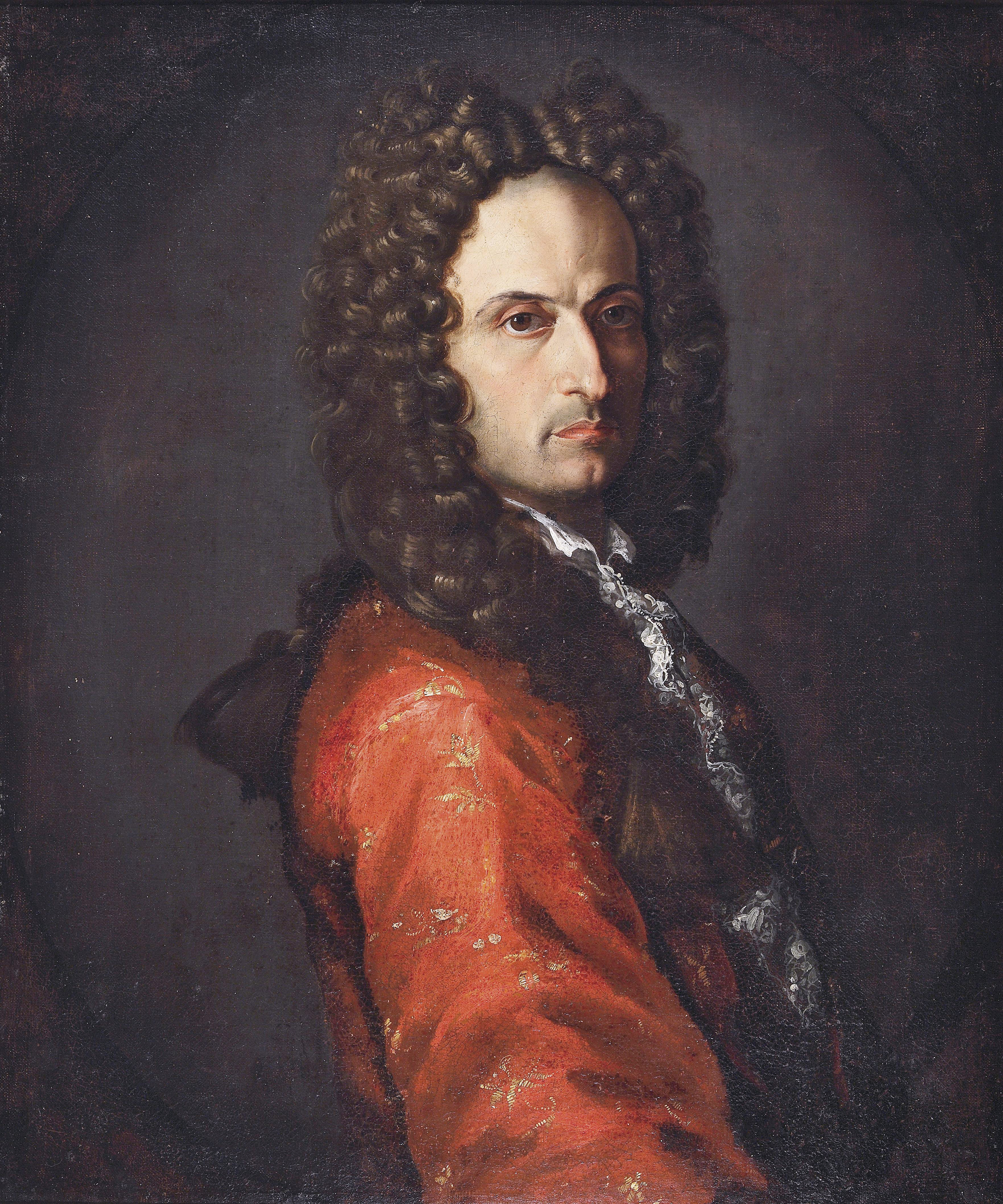 Porträit des Urbano Barberini, Fürst von Palestrina (1664- 1772)Urbano Barberini, Prince of Palestrina (1664–1722)label QS:Lde,"Porträit des Urbano Barberini, Fürst von Palestrina (1664- 1772)"label QS:Len,"Urbano Barberini, Prince of Palestrina (1664–1722)"